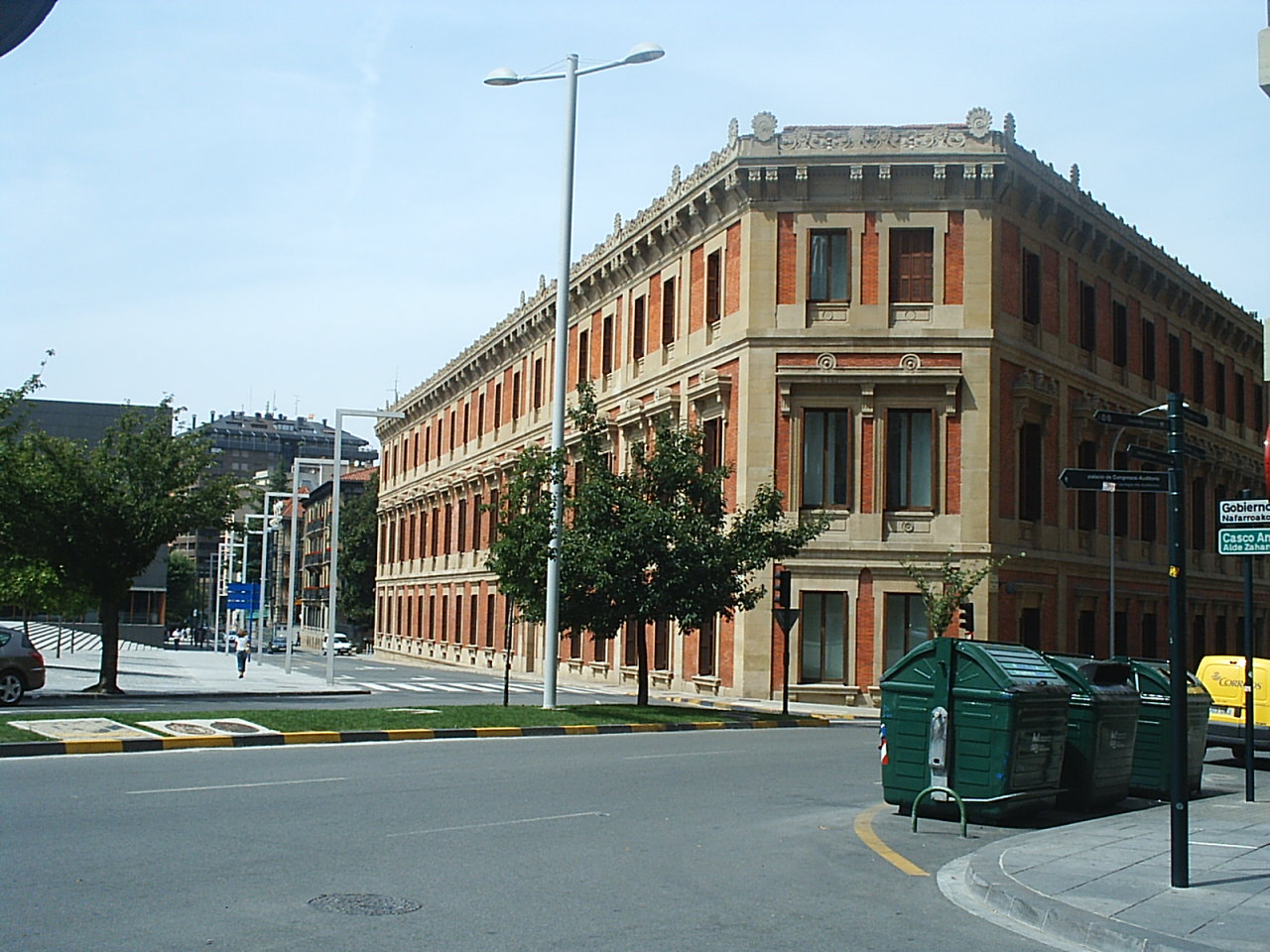 pamplona calle Padre Moret.